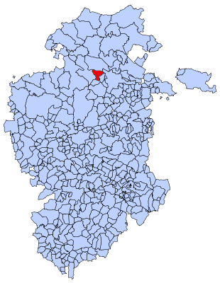 Situación de Rucandio en el mapa de Burgos.